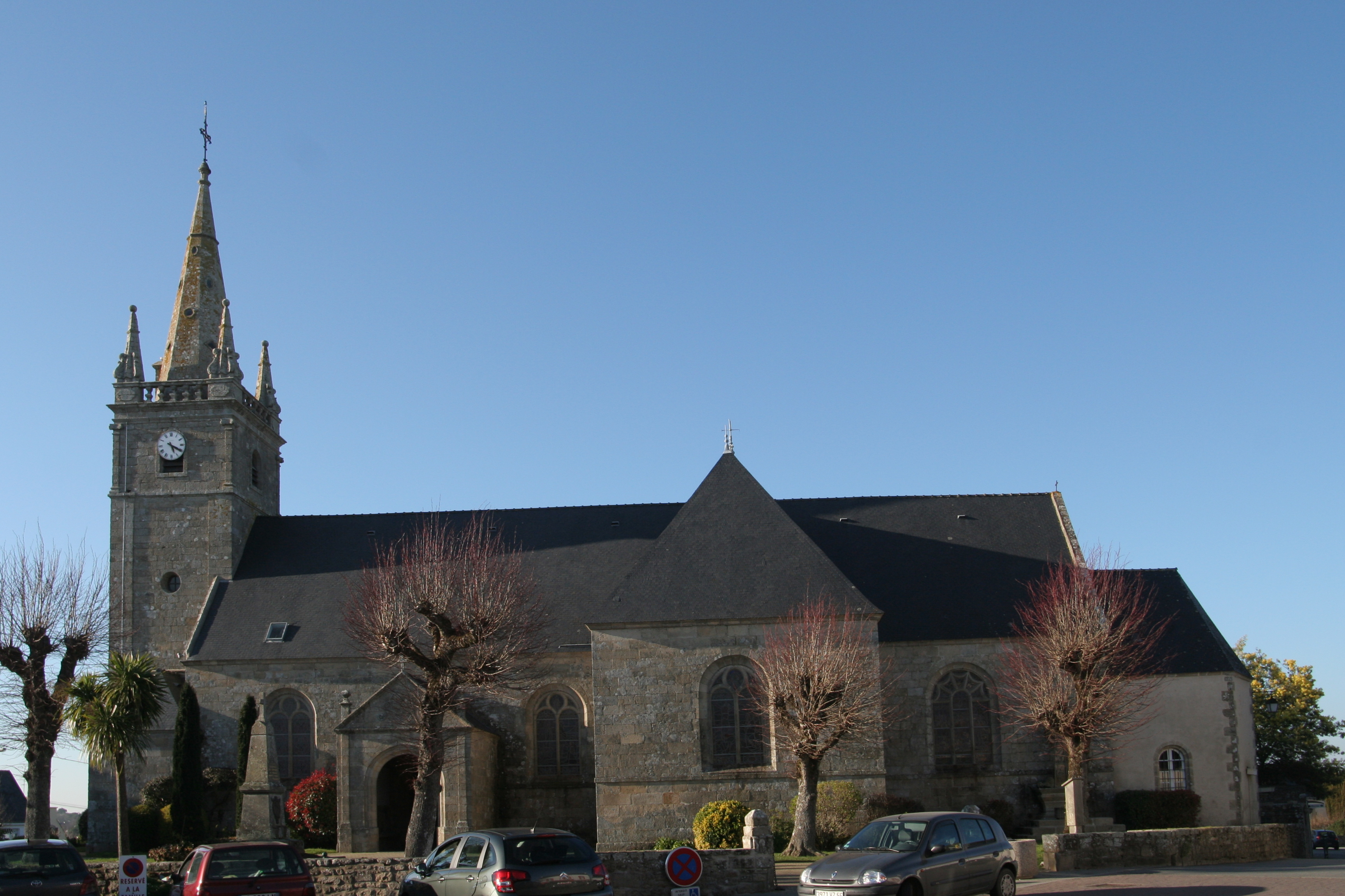 Église Saint-Thuriau de Crach.